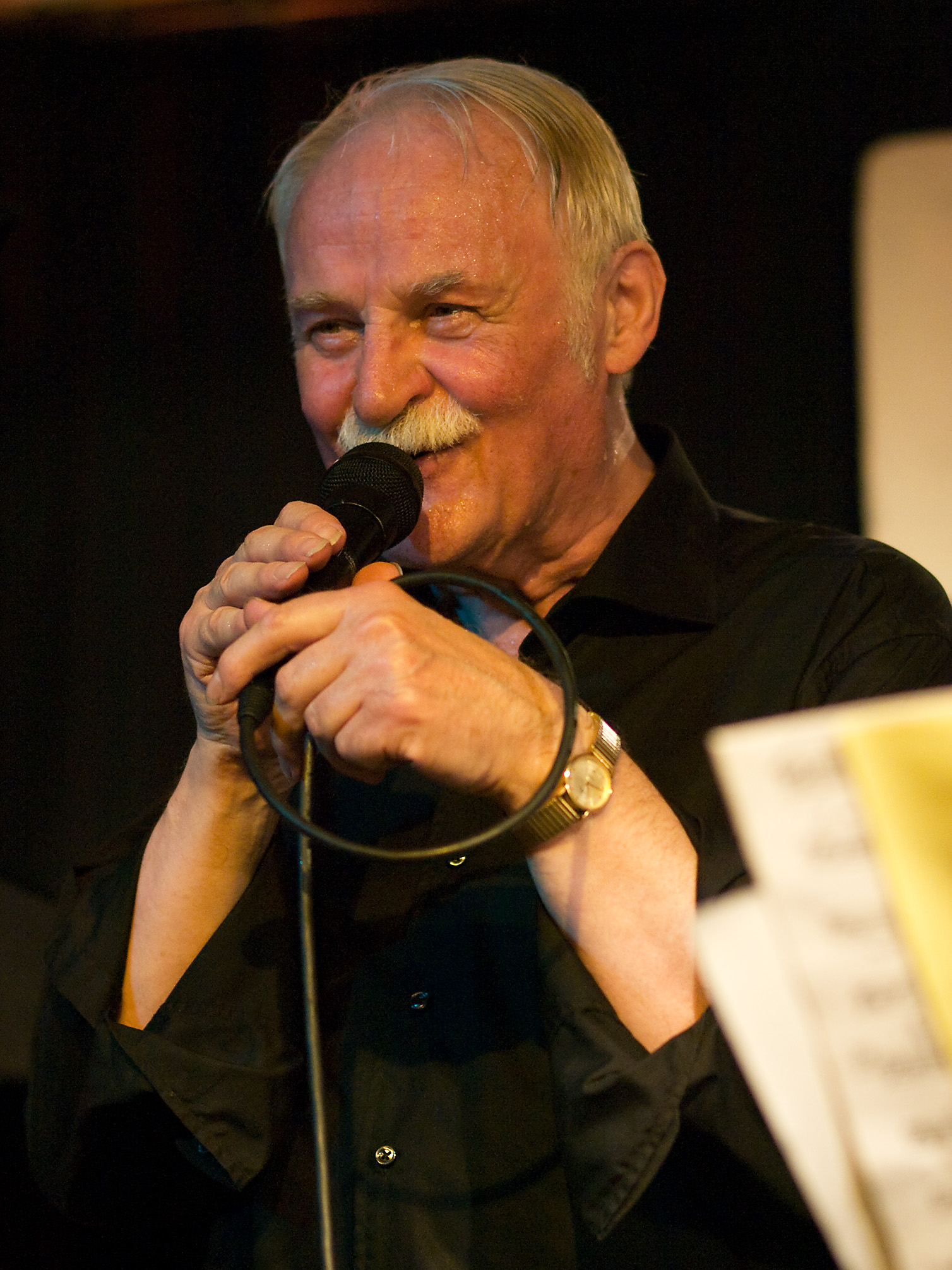 Willi Johanns, jazz singer, picture taken in Jazz club "Unterfahrt" in Munich/Germany